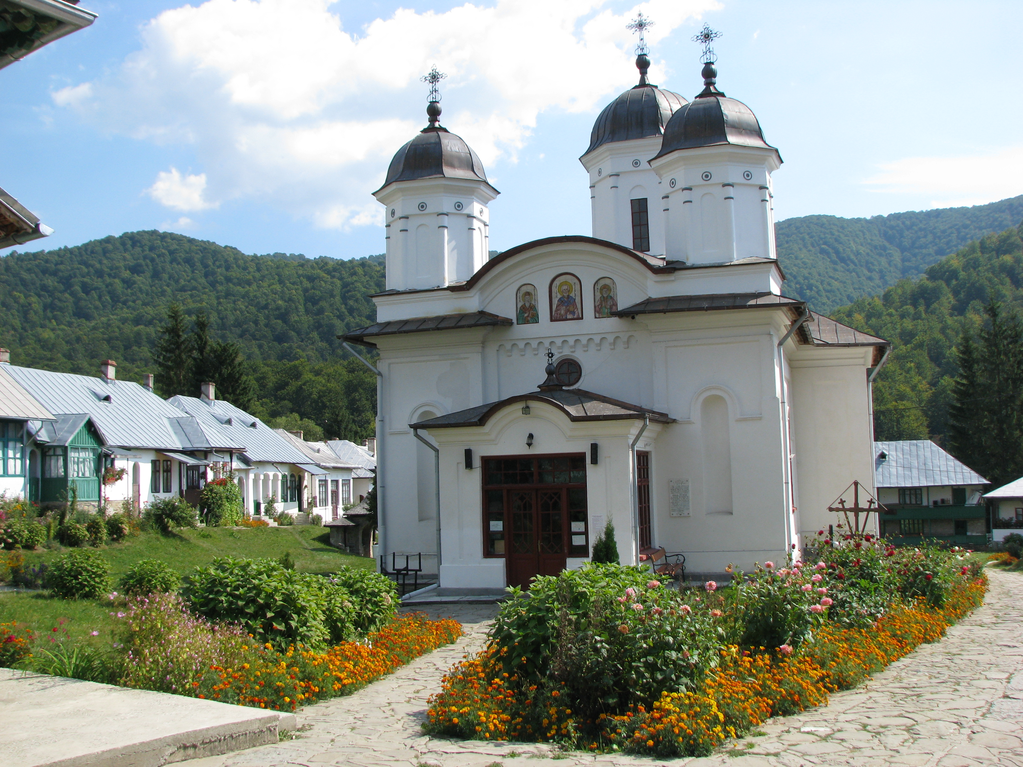 Manastirea Suzana